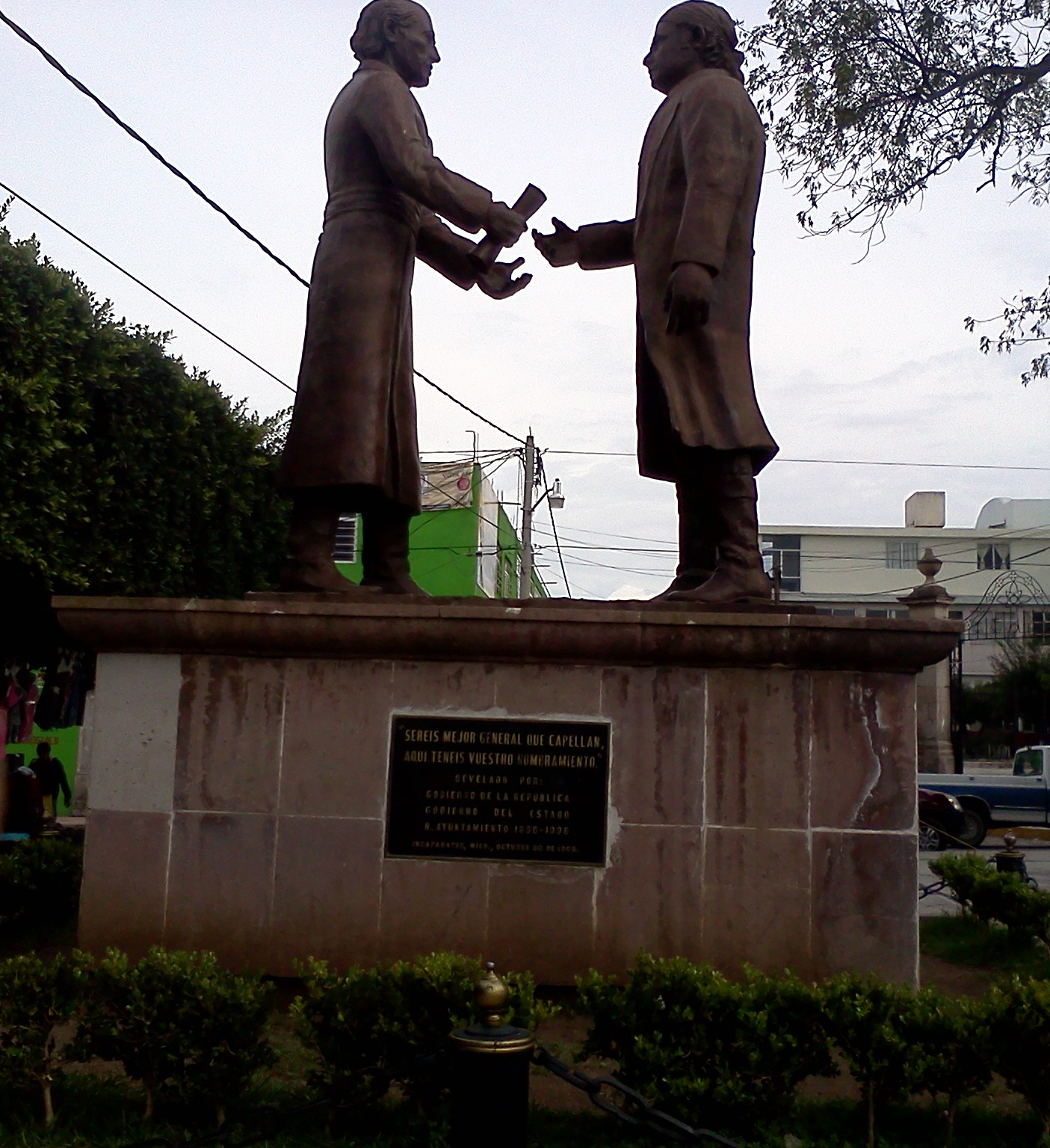 Fotografía tomada en plaza principal del pueblo de Indaparapeo